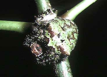 female Araneus seminiger from Okinawa.